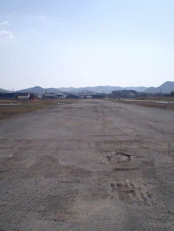 兵庫県加西市にある旧海軍の鶉野飛行場の滑走路跡。現在は陸上自衛隊の管轄である。滑走路中ほどを道路が横断し近隣は戦後開拓地として入植した民家、工場などが立ち並ぶため航空機の離着陸は不可能な状況となっている。